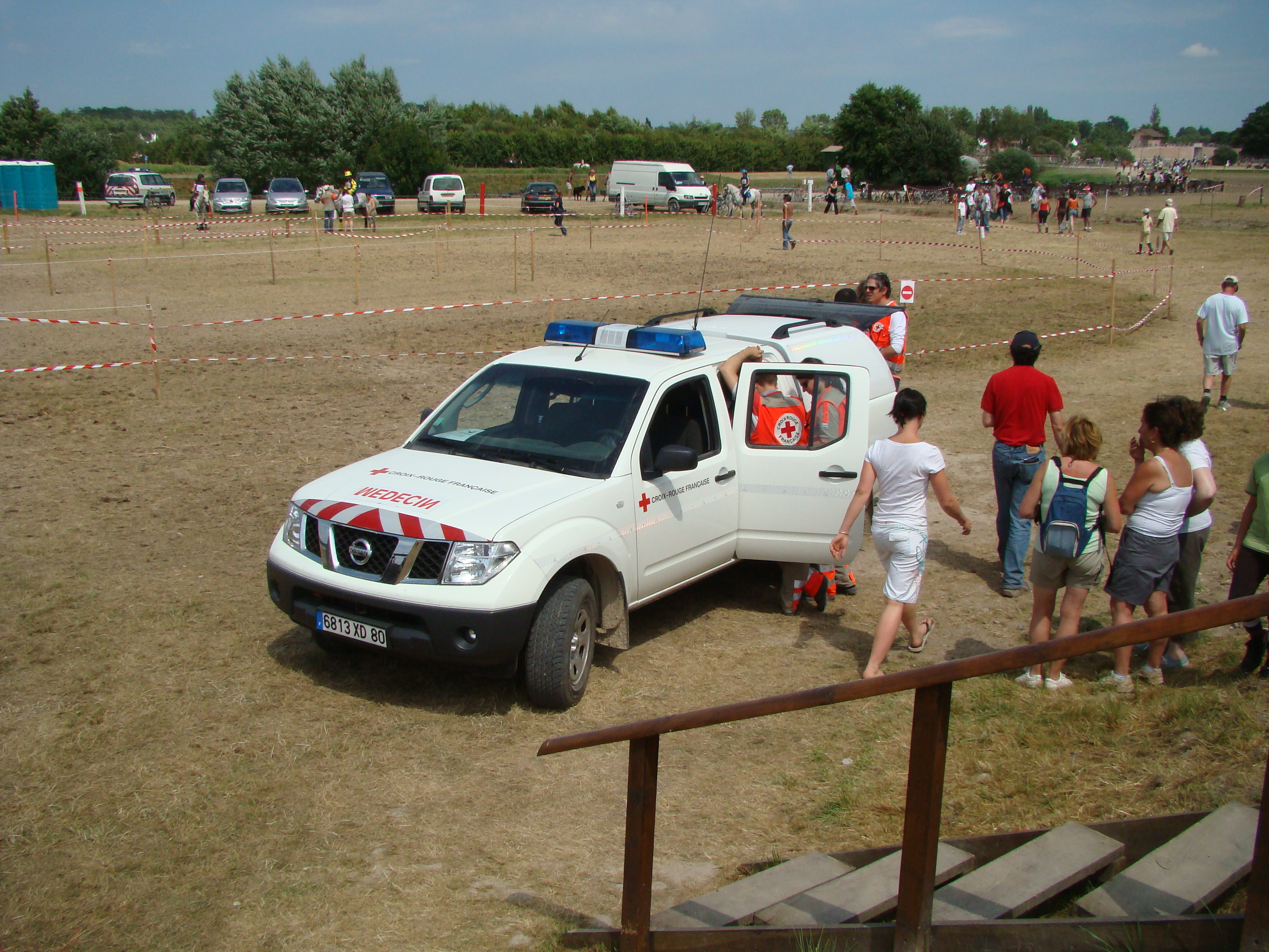 picture taken at 2008 generali opn de france 2008